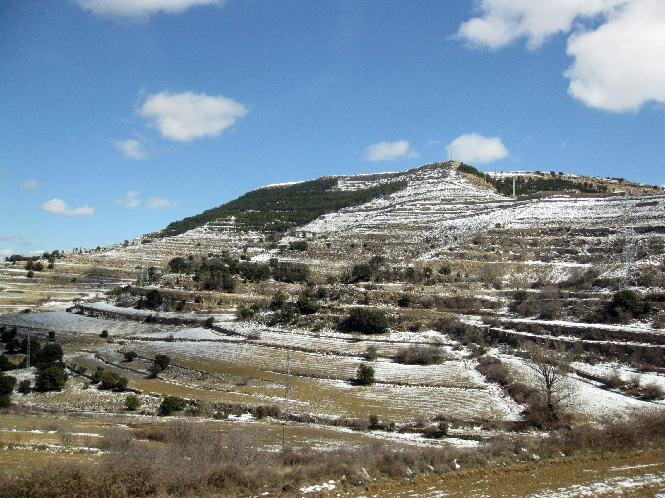 La mola d'Ares, des de l'est (Ares del Maestrat) This is a a photo of a natural area in the Land of Valencia, Spain, with id: ES520059